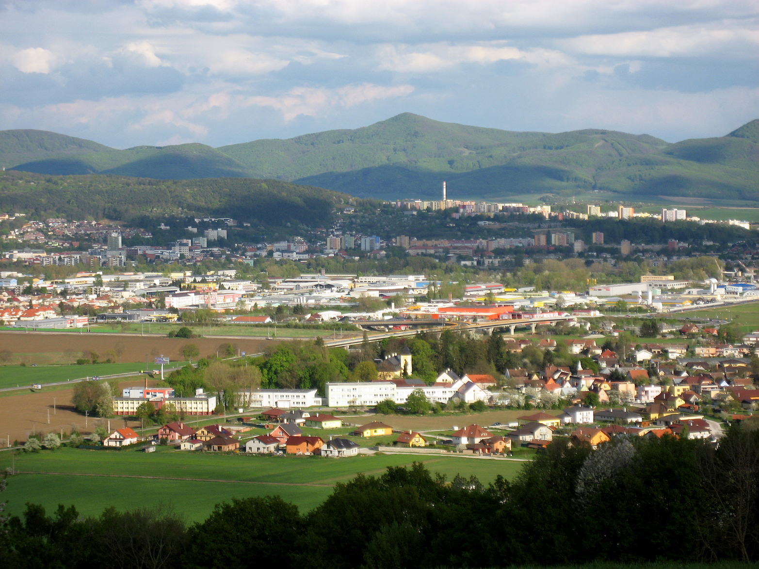 Panoráma Trenčína s novým mostom cez Váh a sídliskom Juh